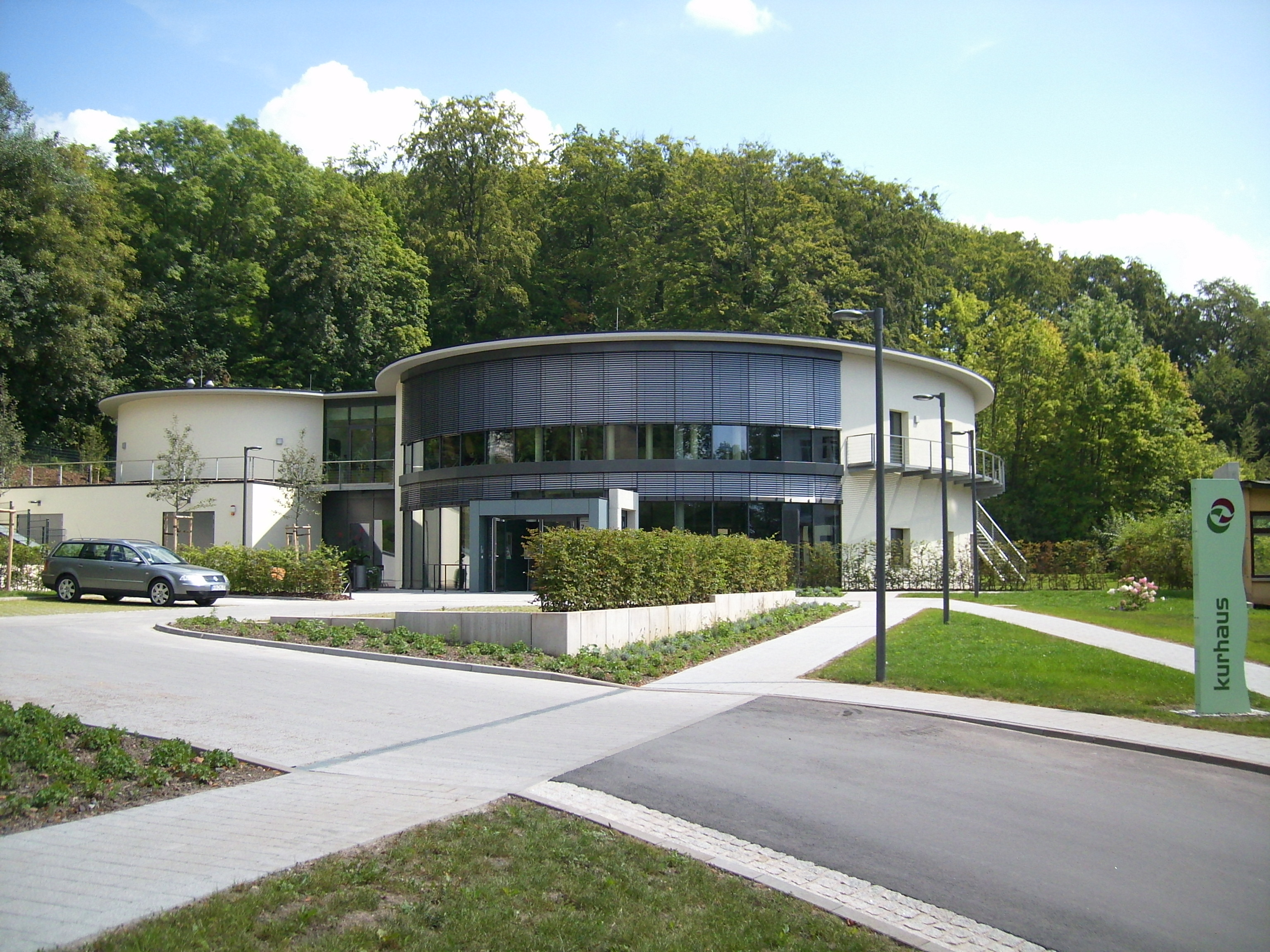 Kurhaus Bad Liebenstein